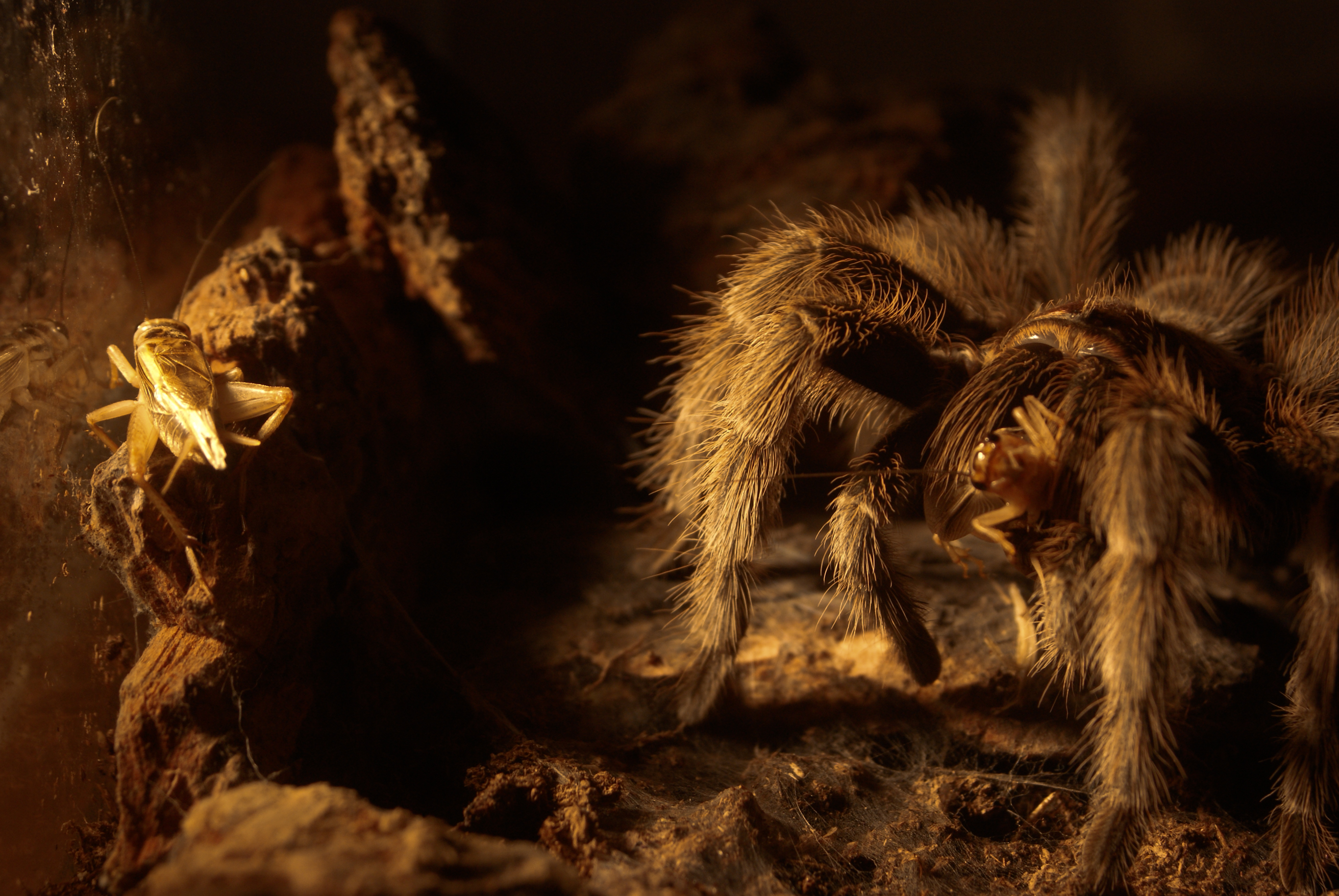 araña chilena pelo rozado comiendo grillos